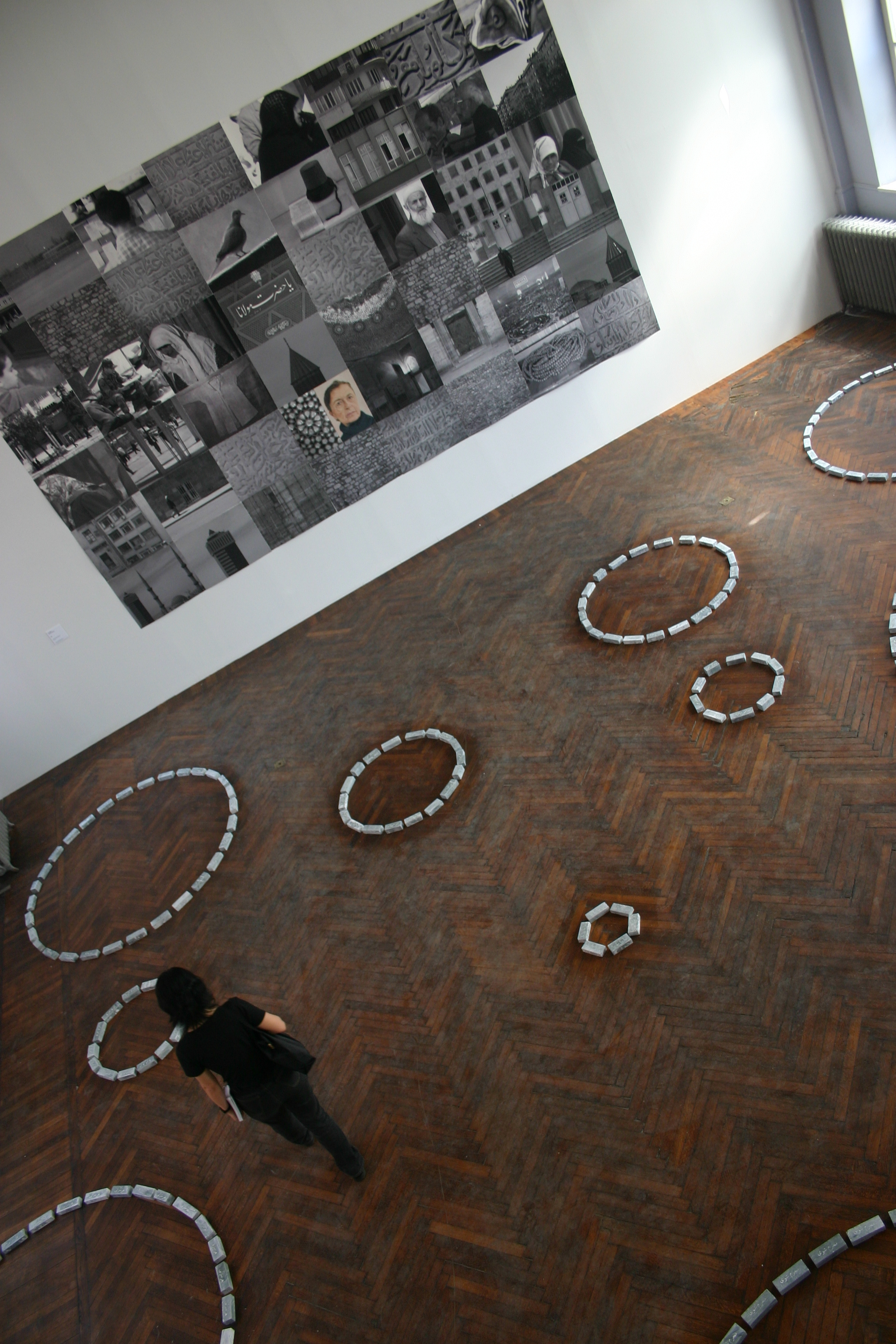 Installation from Istanbul 2005 Biennale. Photo by Bertil Videt